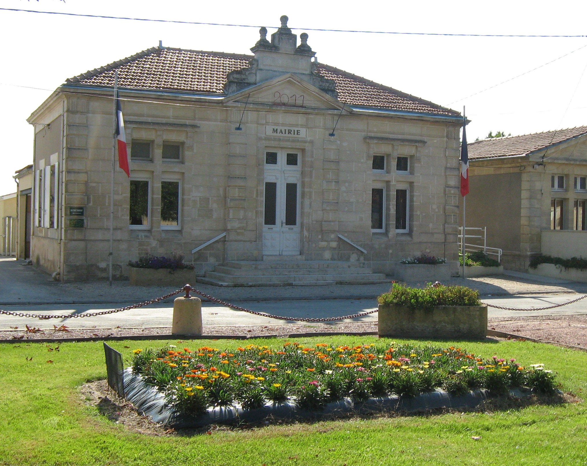 La Mairie de Jau Dignac et Loirac